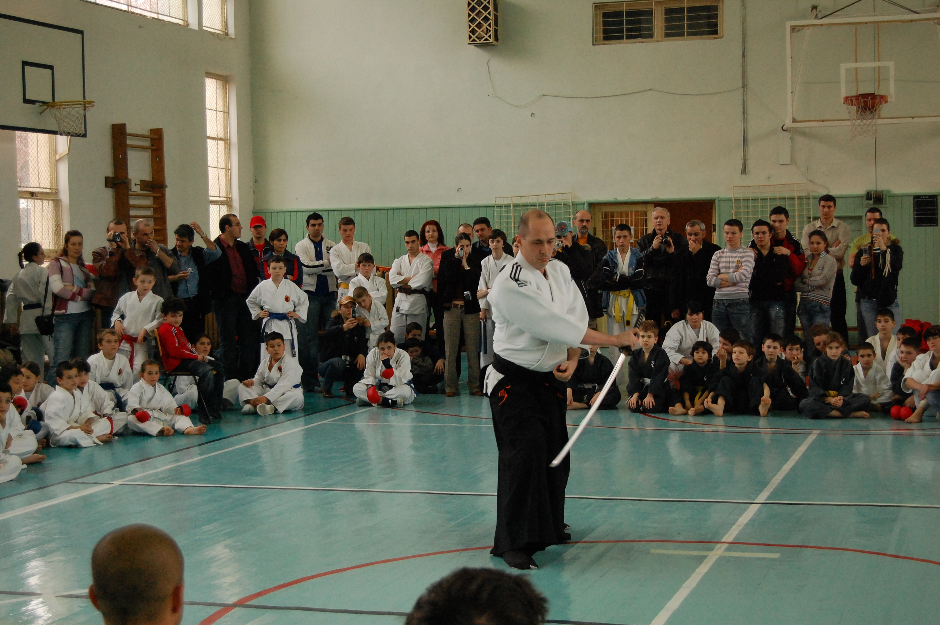 Tehnica de Iai-jutsu - Cristian Vasile Sensei - Vicepresedinte ARAAMA